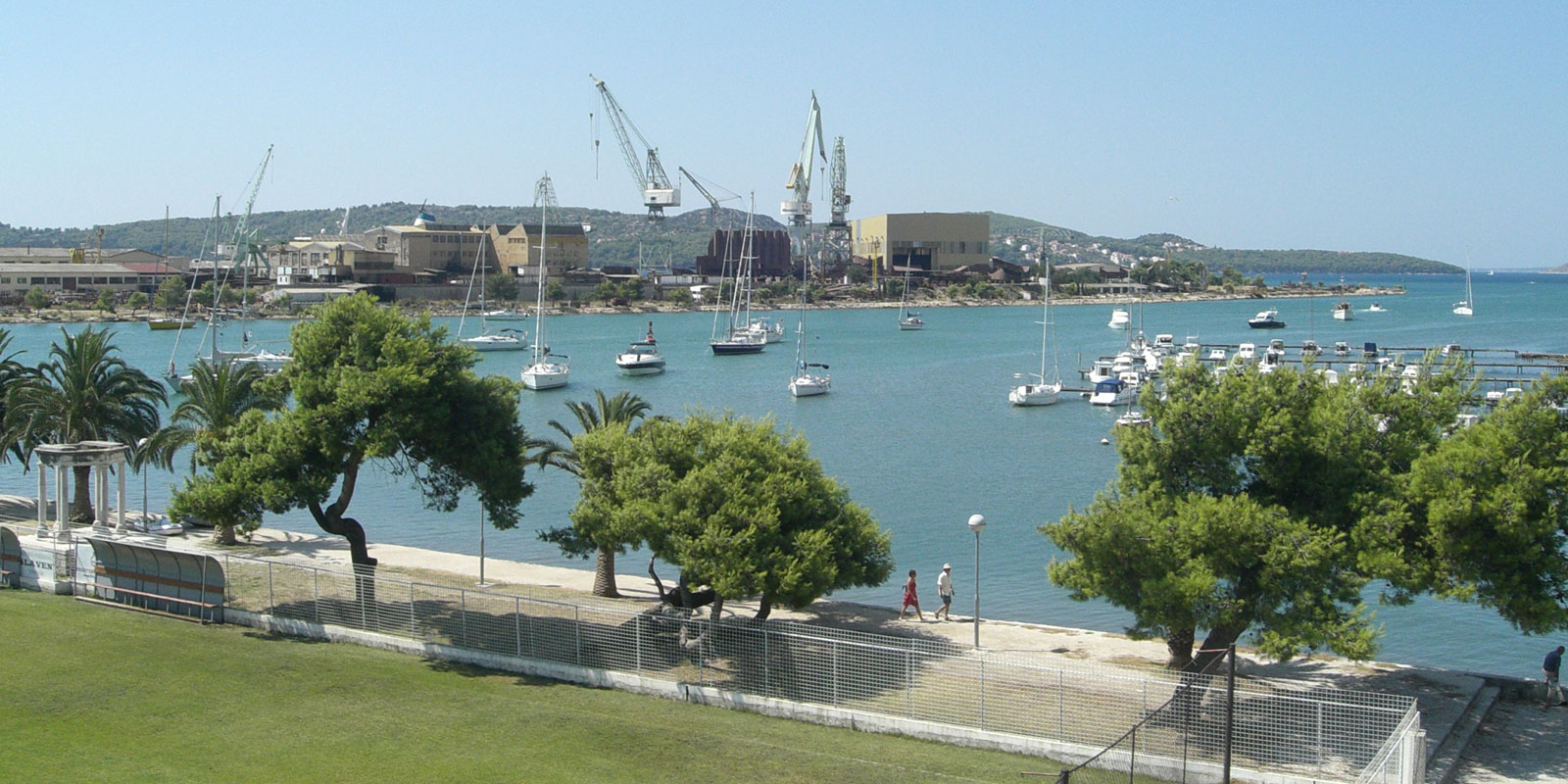 Trogir: brodogradilište